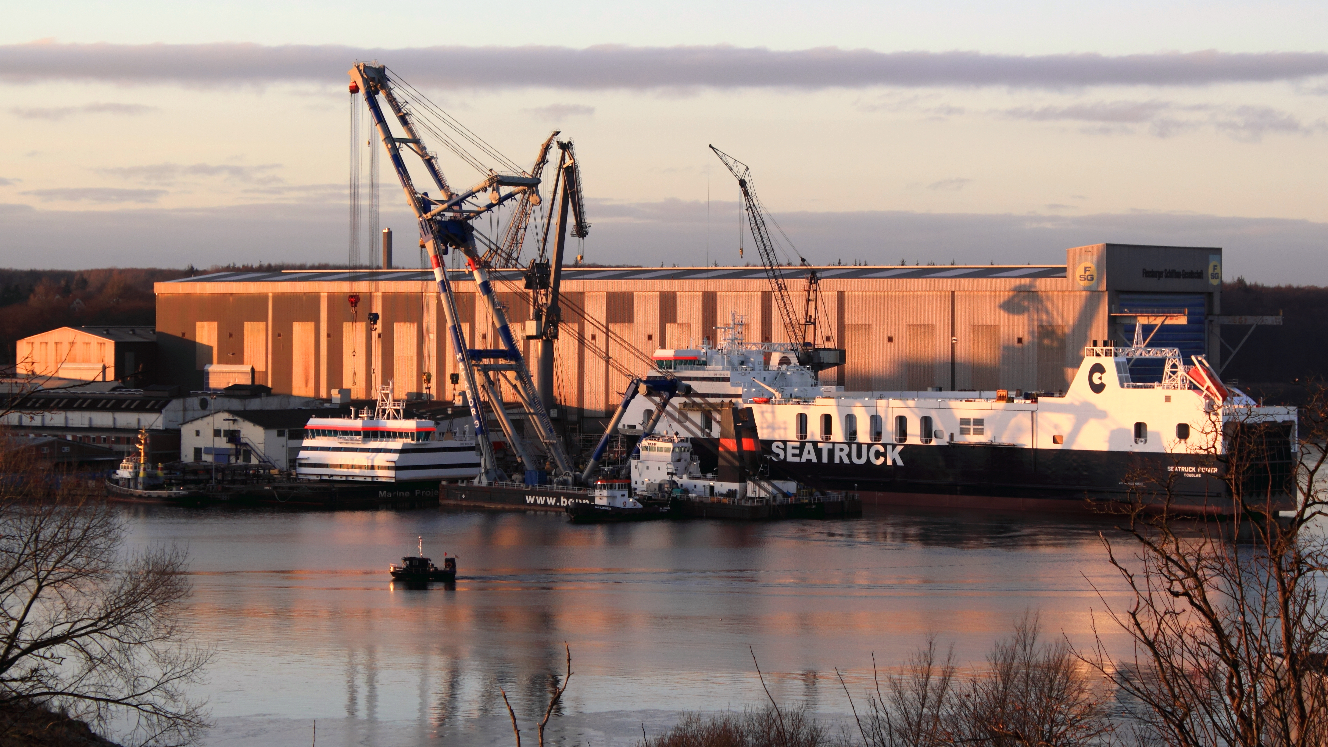 Flensburg Werft 2012, Ship Seatruck Power, Schwimmkran Matador 3